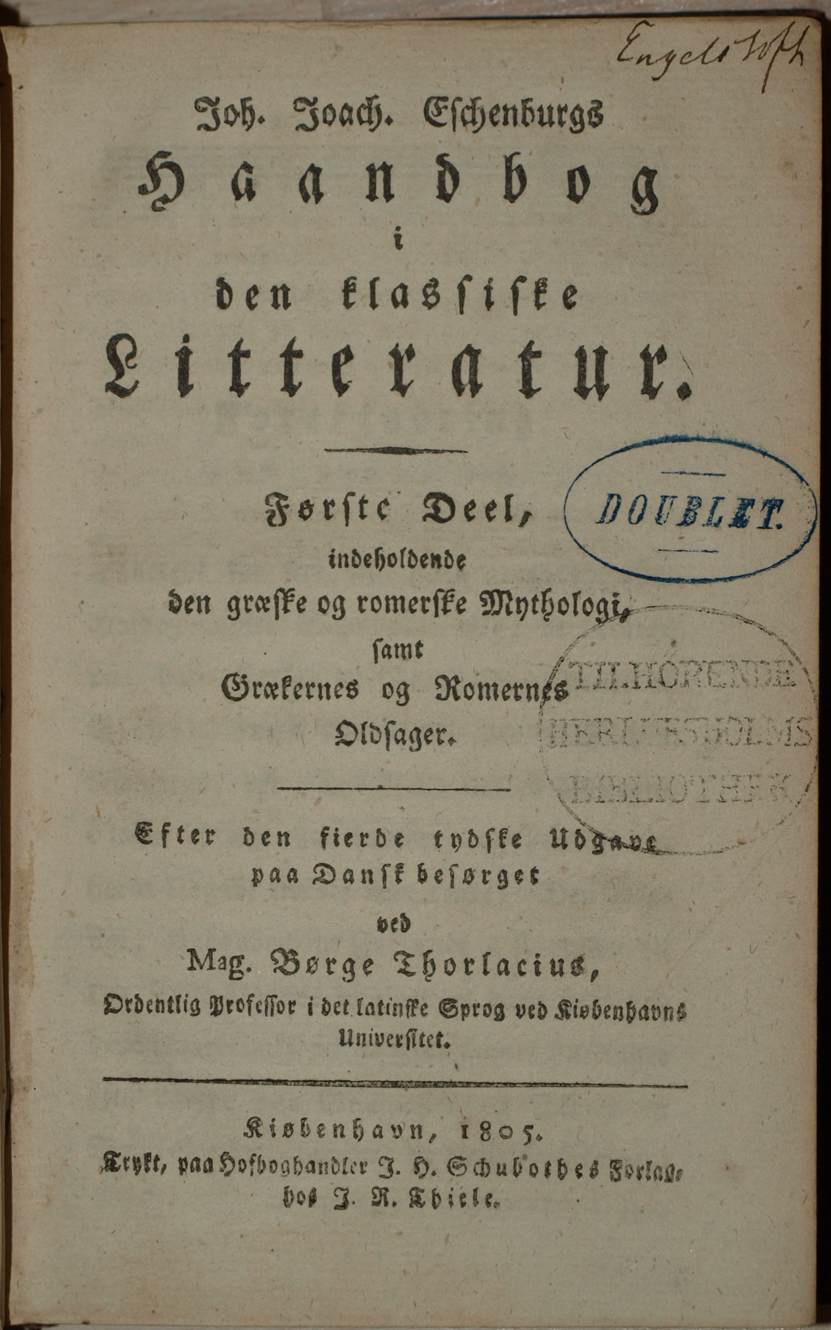 Titelbladet til bogen Haandbog i den klassiske Litteratur - Første Deel af Johann Joachim Eschenburg. Med historikeren Laurids Engelstofts signatur i øverste højre hjørne.